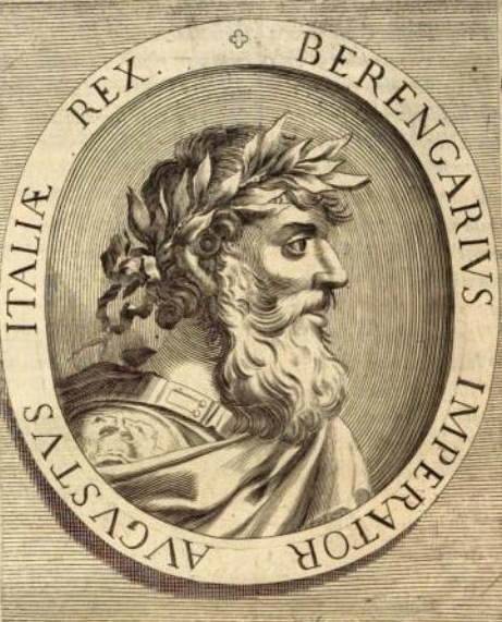 Ilustración en el libro indicado